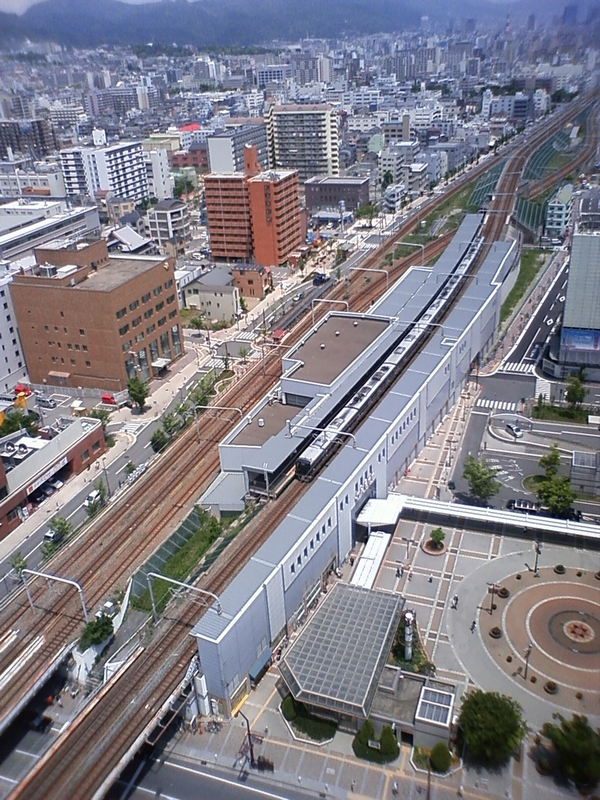 JR西日本 JR神戸線 新長田駅 俯瞰画像